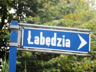 Znak: ulica Łabędzia w Katowicach